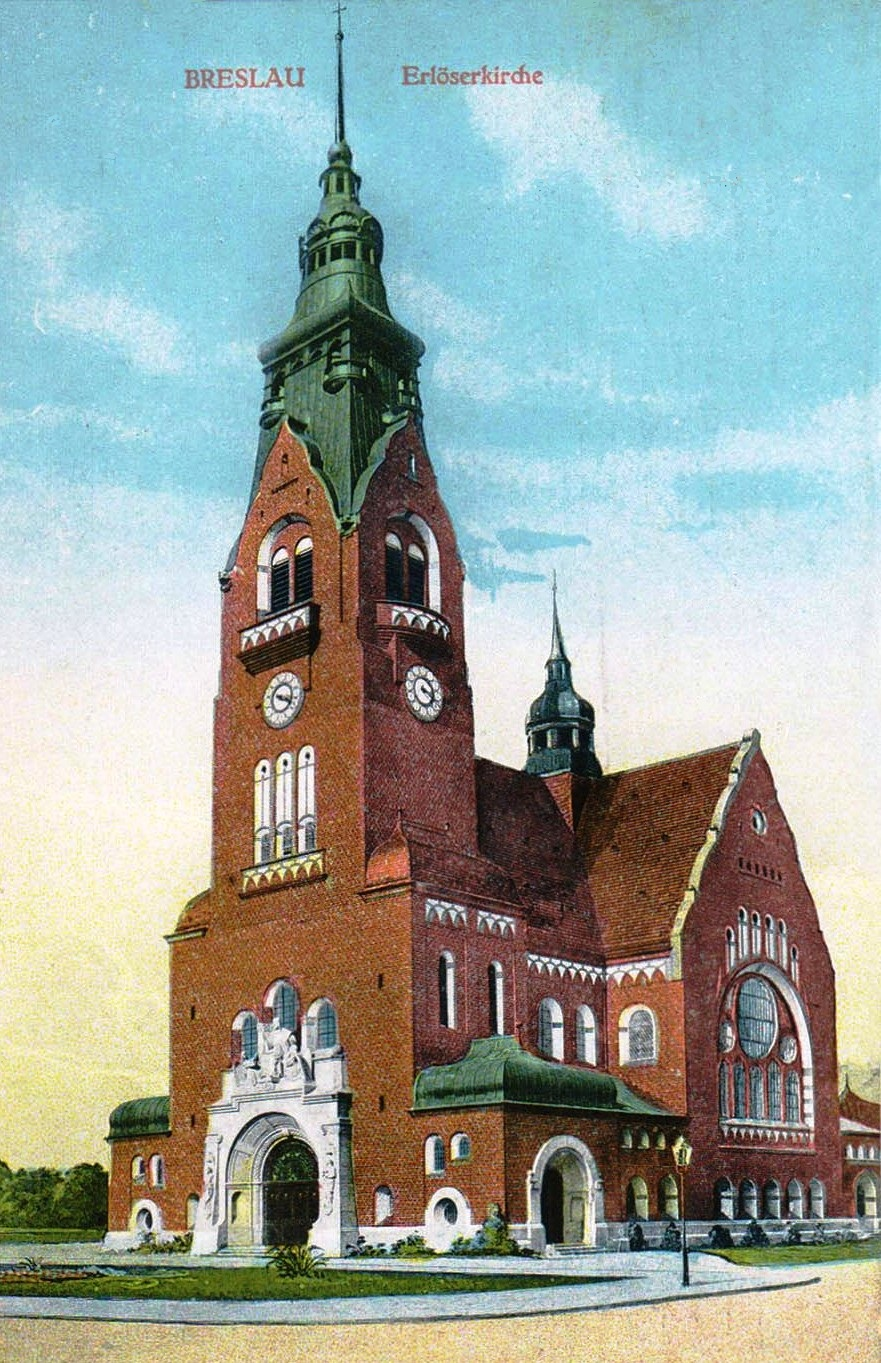 ehemalige evangelische Erlöserkirche in Breslau